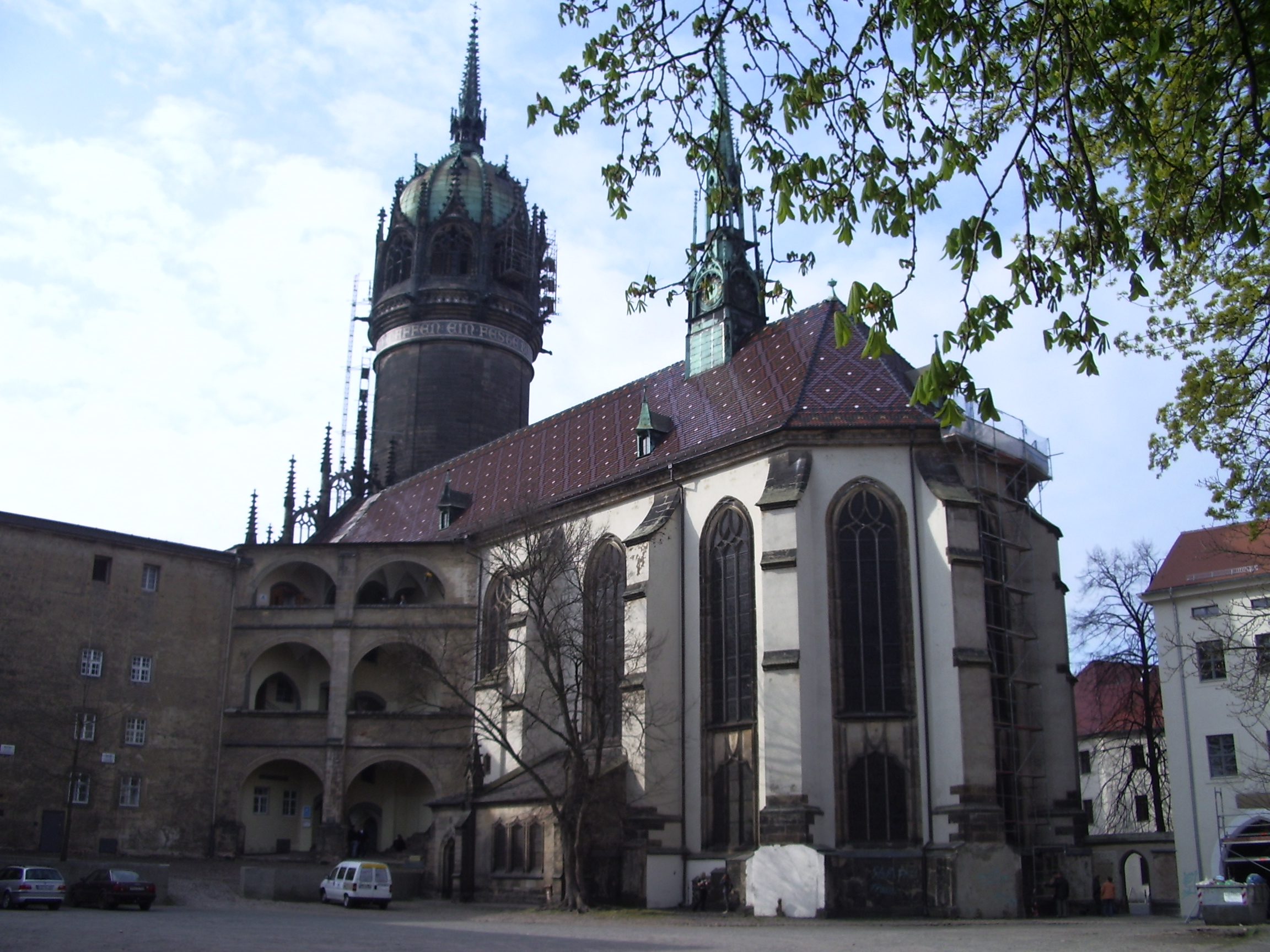 Wittenberg Schlosskirche